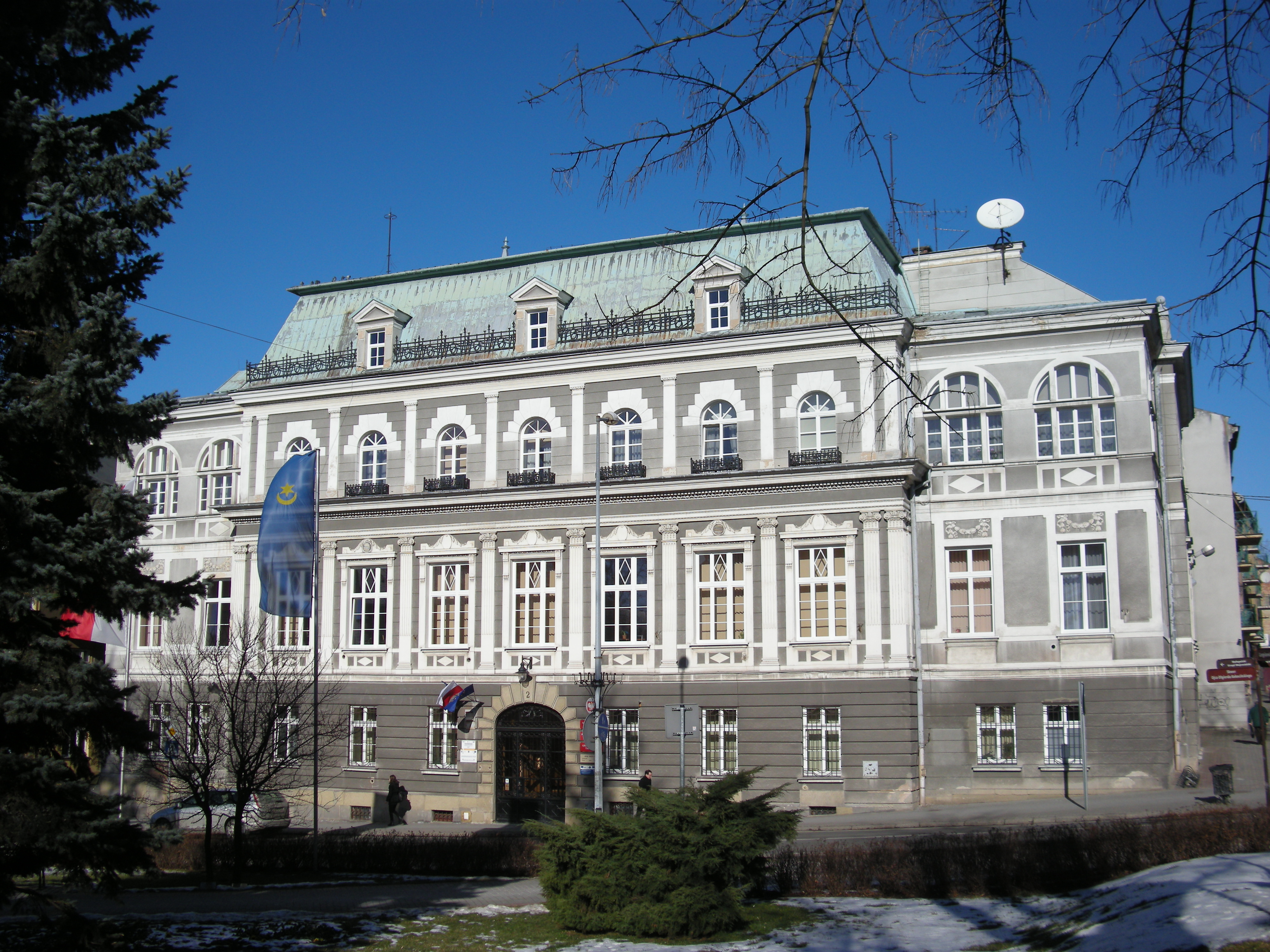 Budynek dawnego Banku Austro-Węgierskiego. Obecnie siedziba Prezydenta Tarnowa